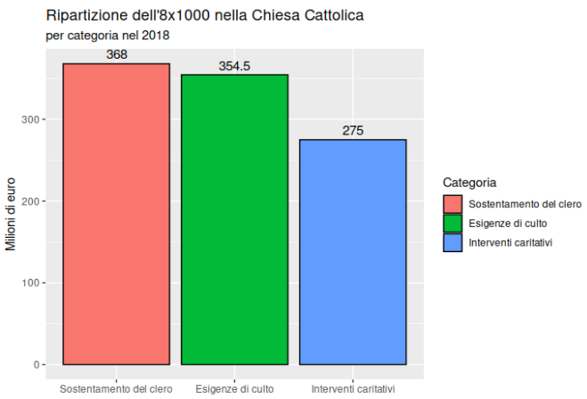 file realizzato con RStudio con dati dal rendiconto della Chiesa Cattolica